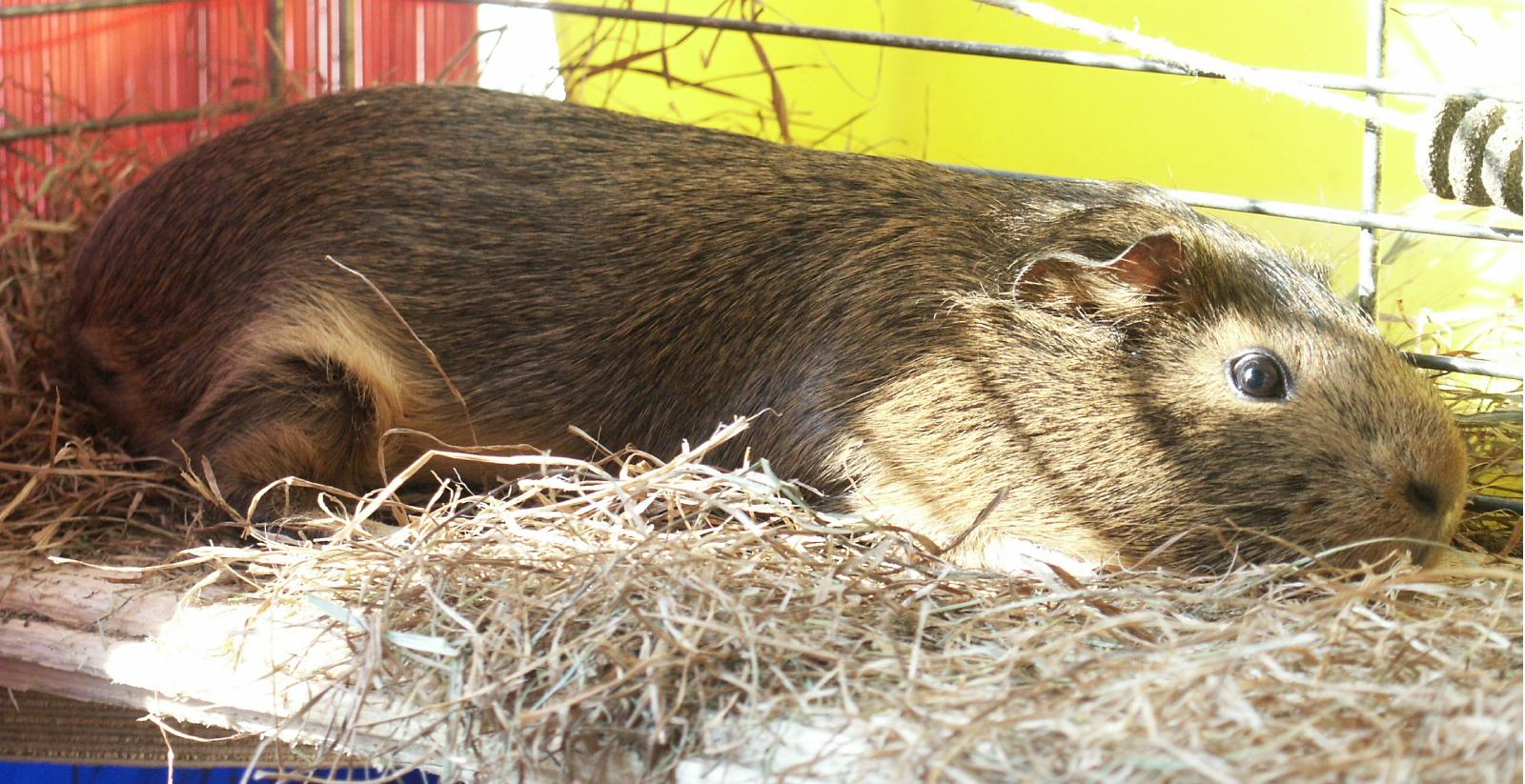 Meerschweinchen doest in der Sonne